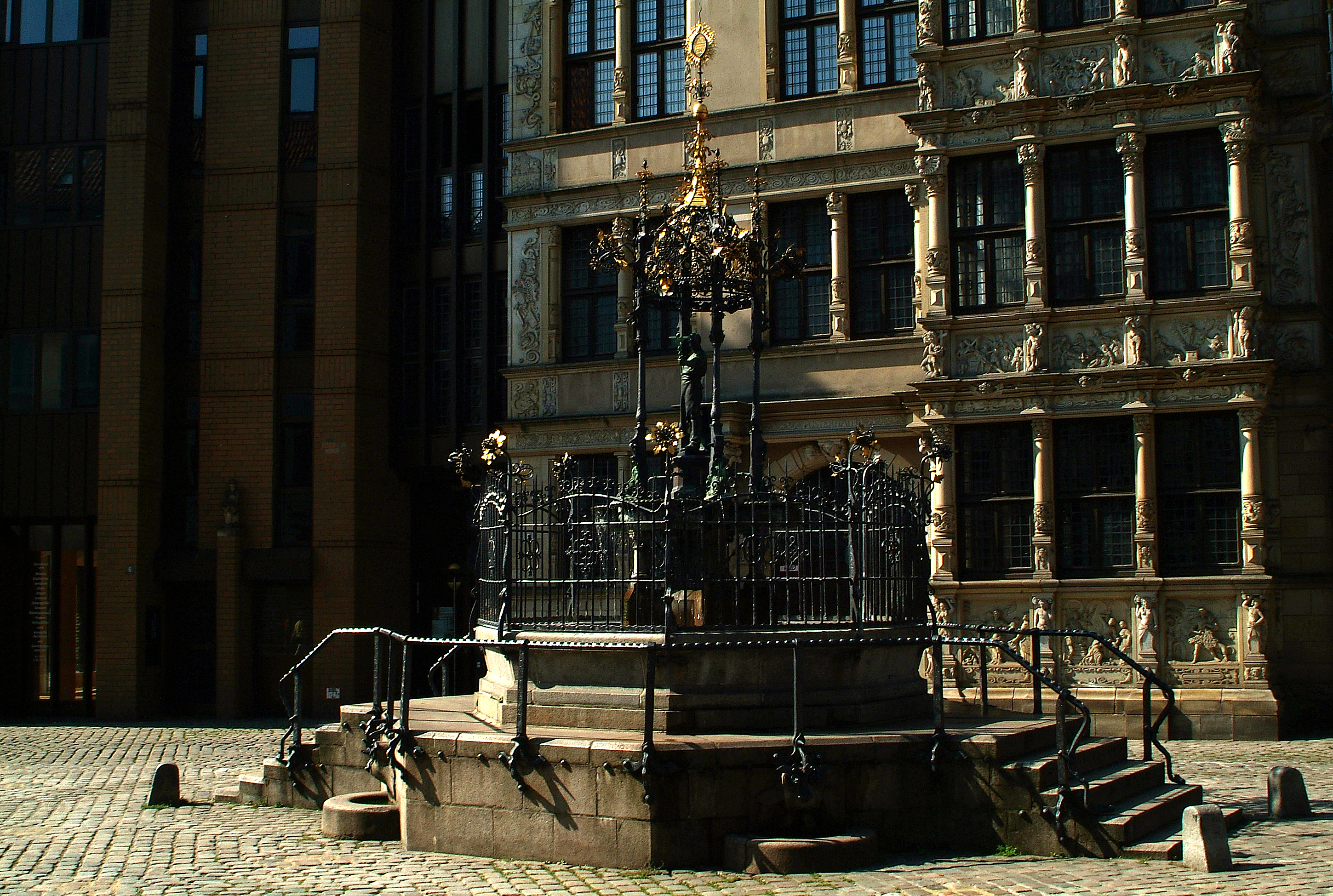 Der Oscar-Winter-Brunnen wird nach seinem Standort auch Holzmarktbrunnen genannt.